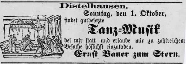 Zeitungsanzeige des Bierbrauers Ernst Bauer, Wirt des Gasthauses „zum Stern“ in Distelhausen, aus dem später die Distelhäuser Brauerei hervorging. In: Die Tauber. Tauberbischofsheimer Amtsblatt, 1876.